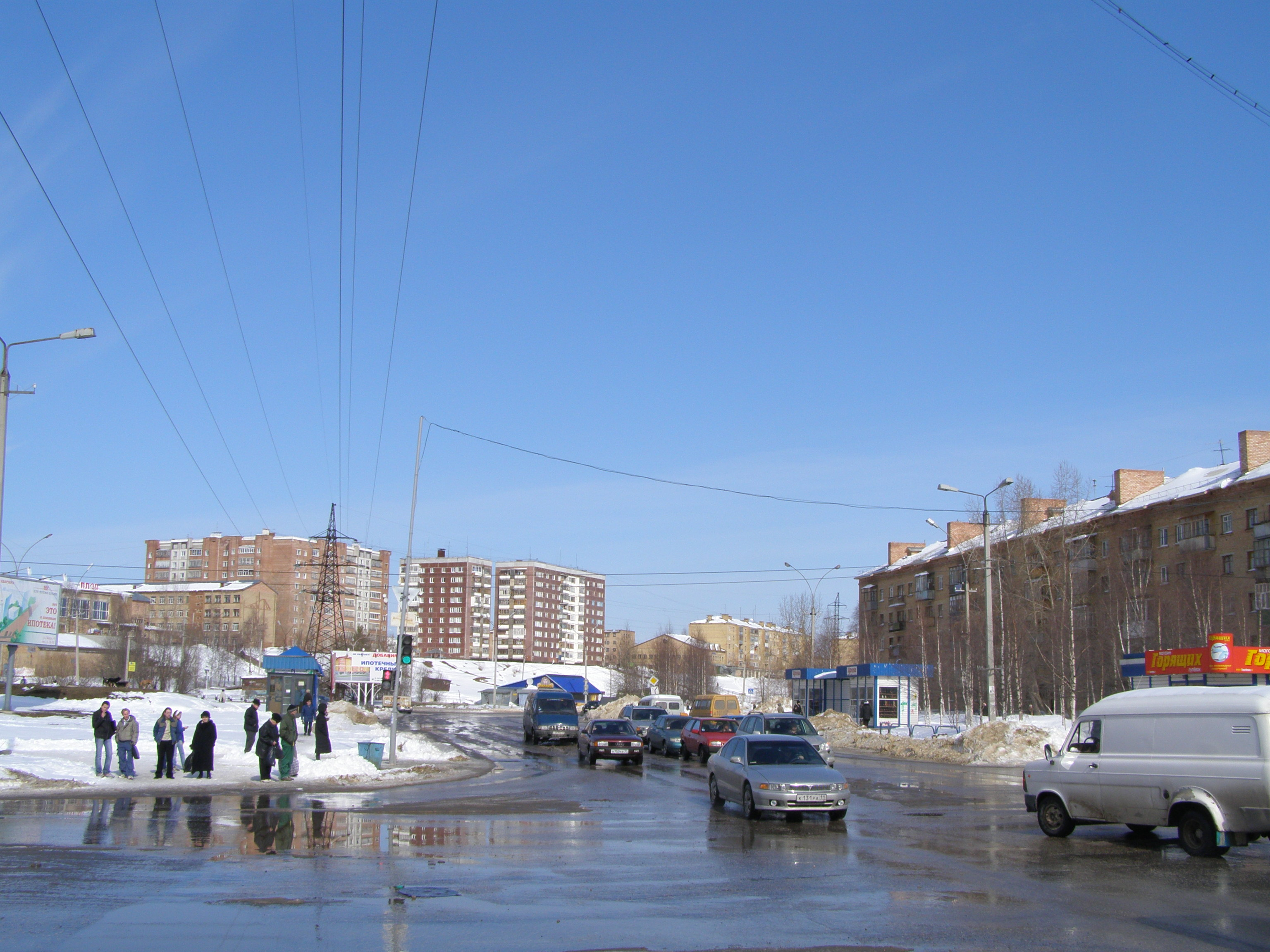 Ukhta